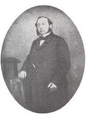 Herrmann Gerson, jüdischer Modemacher und Gründer des ersten Berliner Kaufhauses.